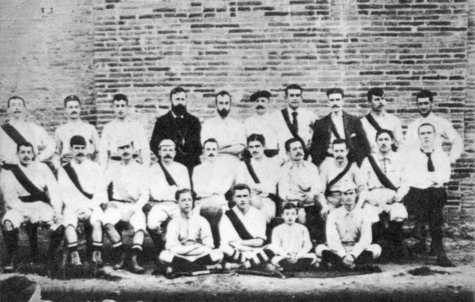 Instantània de l'històric Barcelona Foot-ball Club, un dels primers equips formats a Barcelona, integrat bàsicament per membres de la colònia britànica.